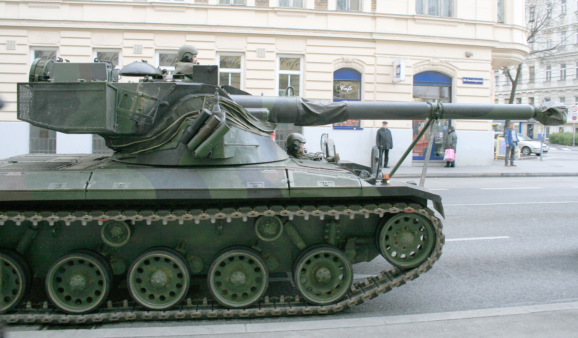 SK105 - Kürassier-Panzer des österreichischen Bundesheeres, fotografiert in Wien-Penzing / SK105 - Kürassier-tank of the Austrian army, seen in Vienna